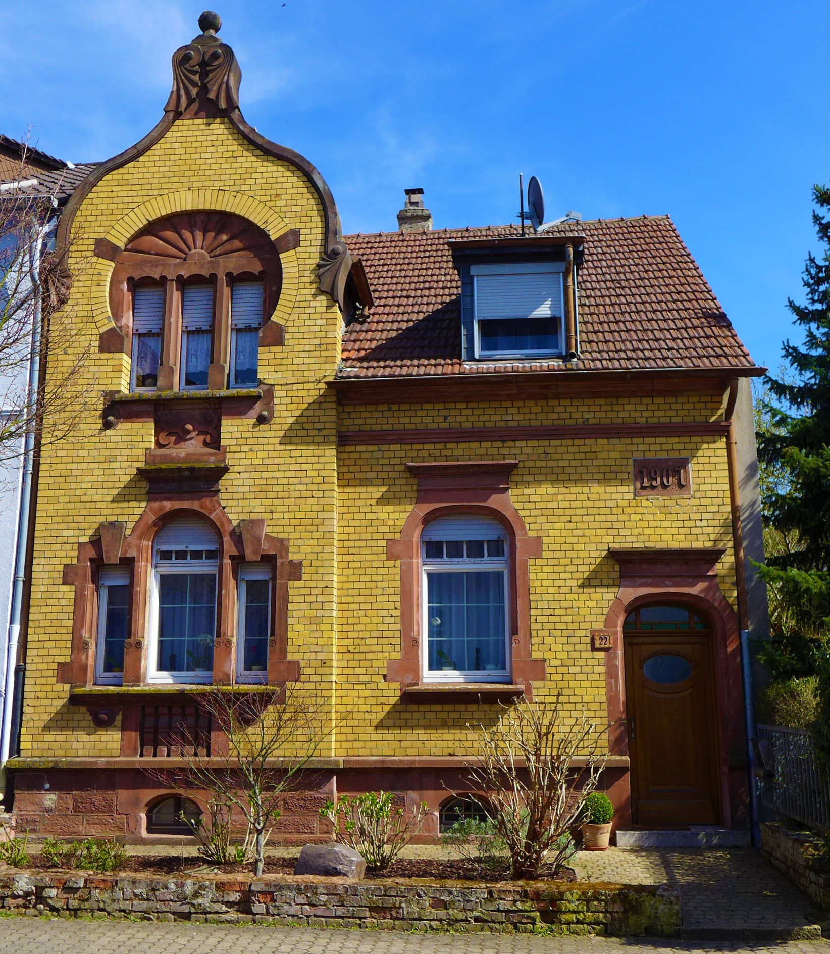 Dillingen/Saar, Jugendstilhaus in der Bismarckstraße